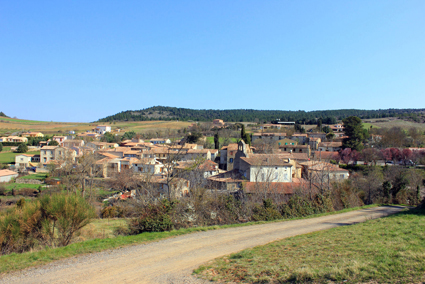 Foto del vilatge de Luc d'Aude en Lengadòc